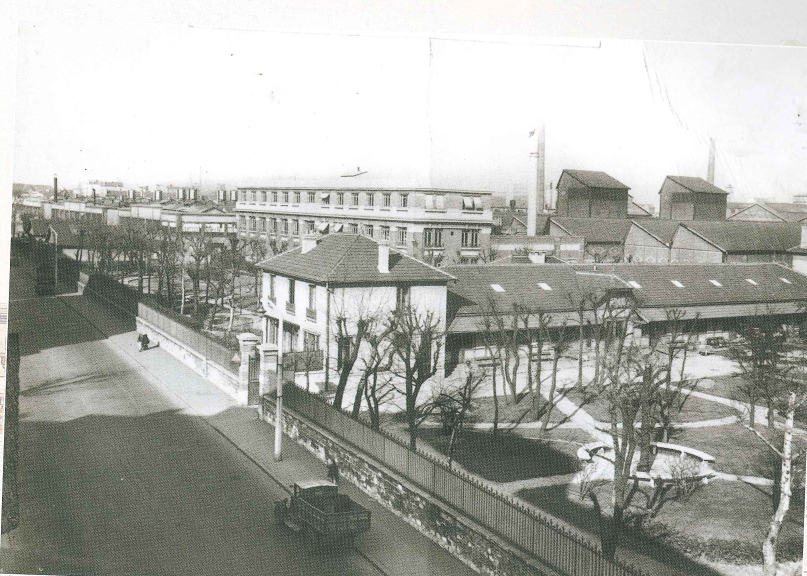 Vu de l'usine Carbone Lorraine, coté cantine (1948)